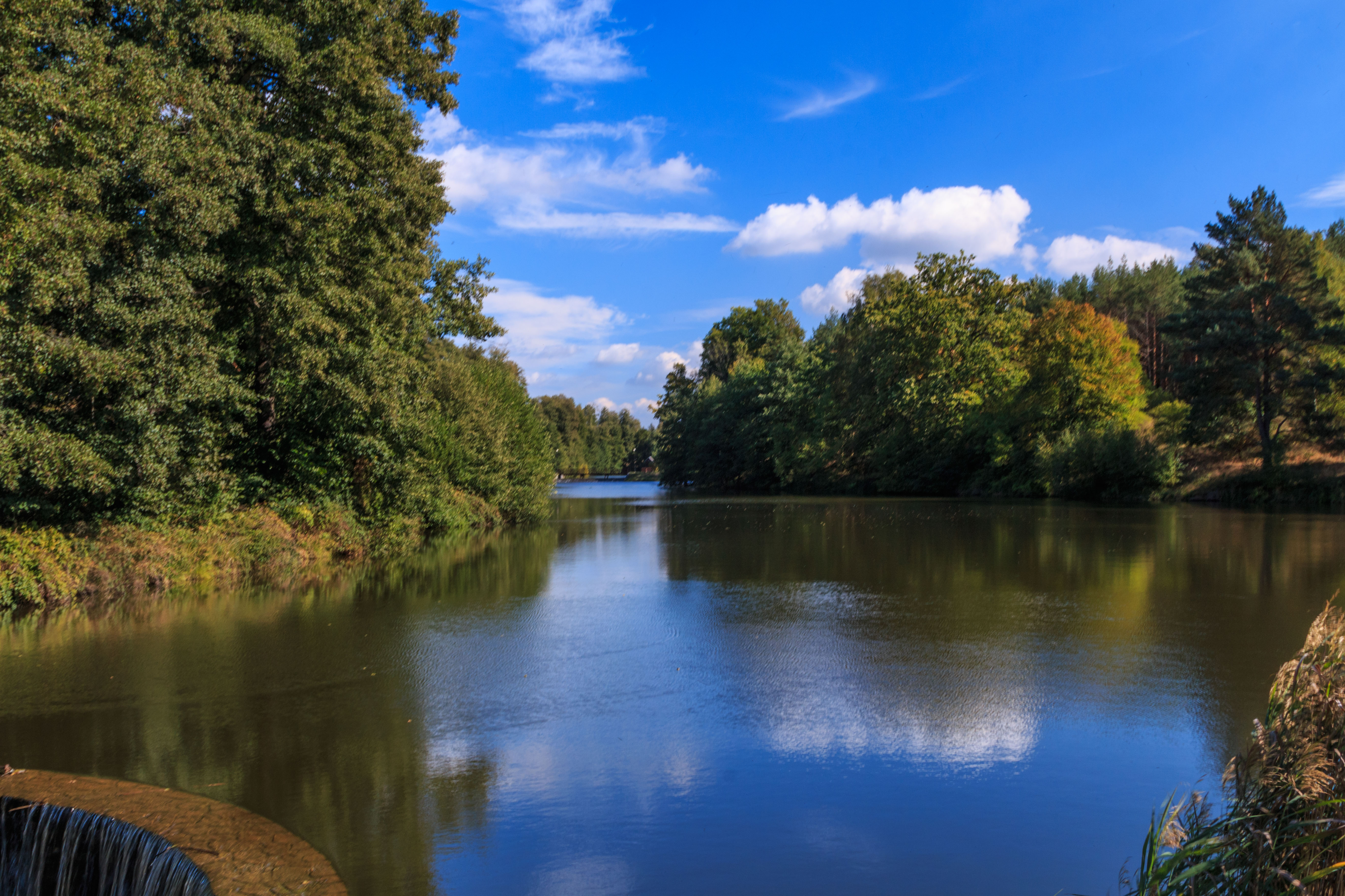 Dolní Hvězdovský rybník Project: Vodstvo.